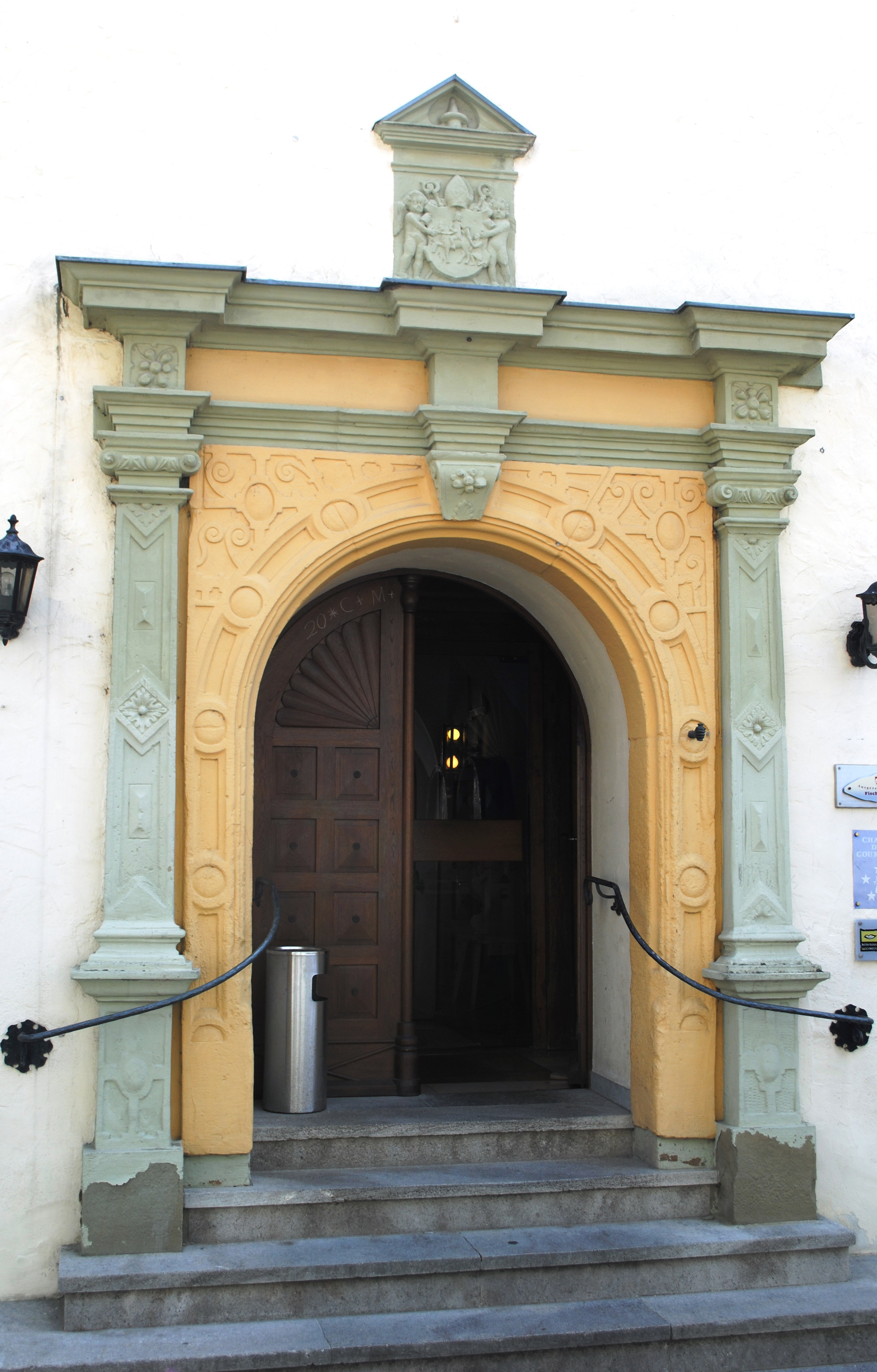 Portal, Zehnthof, Hauptstraße, Nordheim am Main